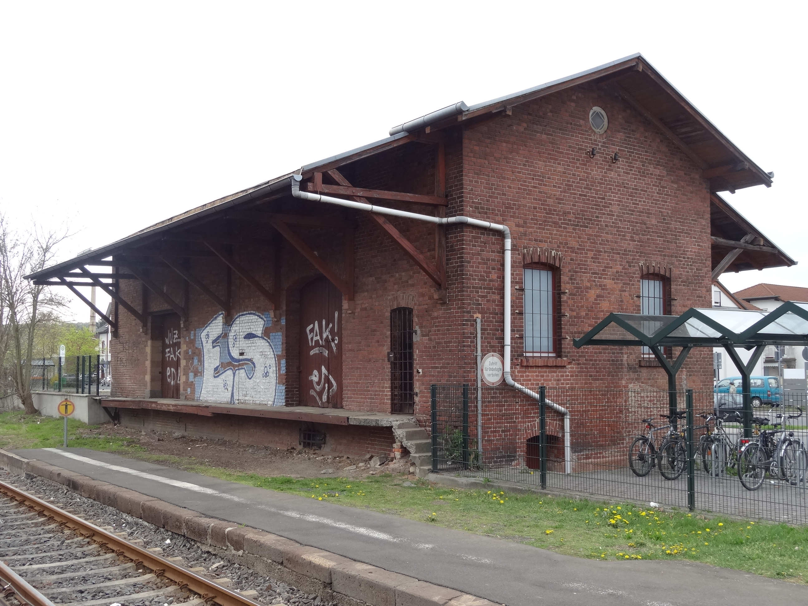 Bahnhofstraße 1 (Lich)